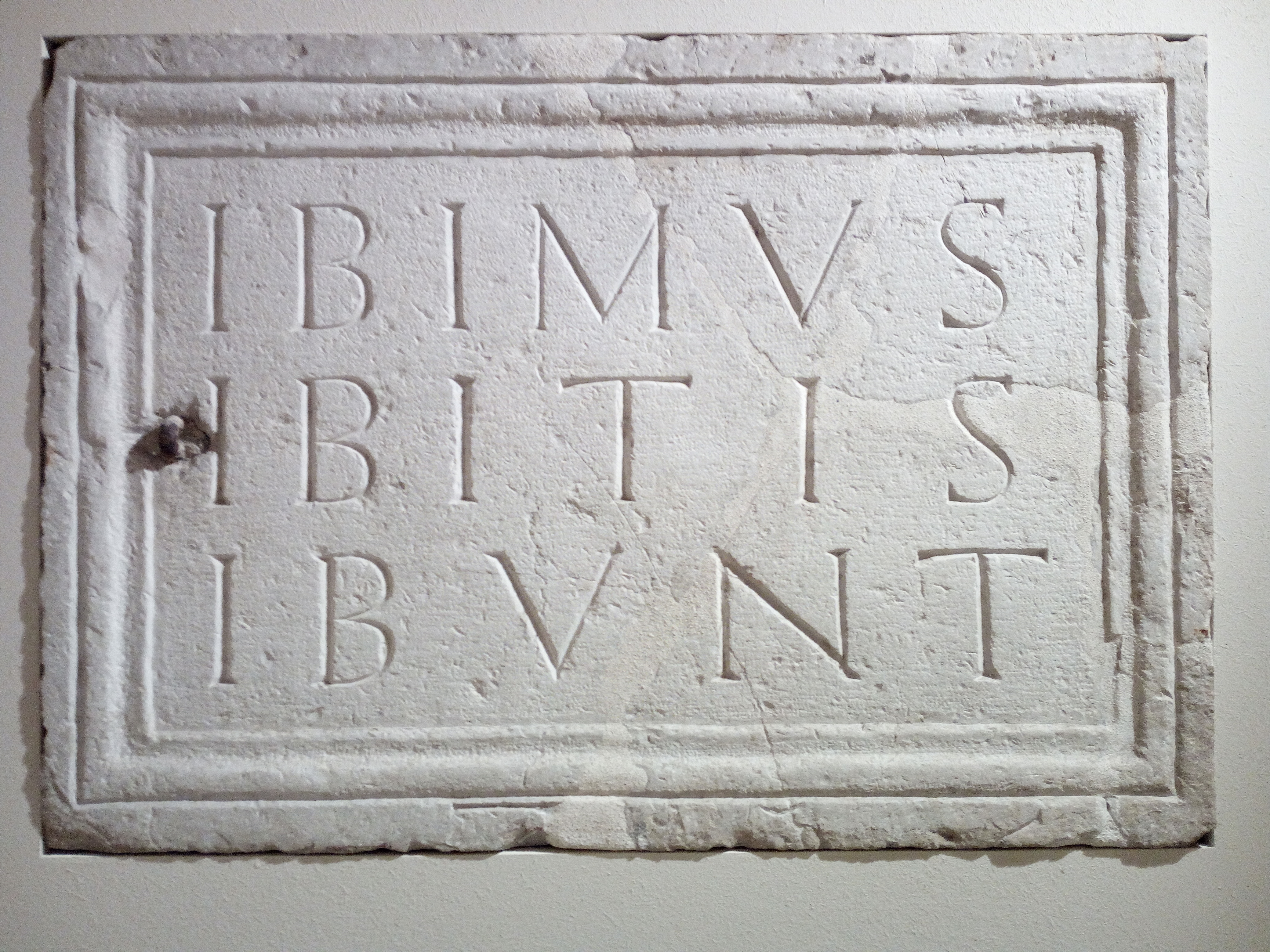 MAST Castel Goffredo-Epigrafe gonzaghesca